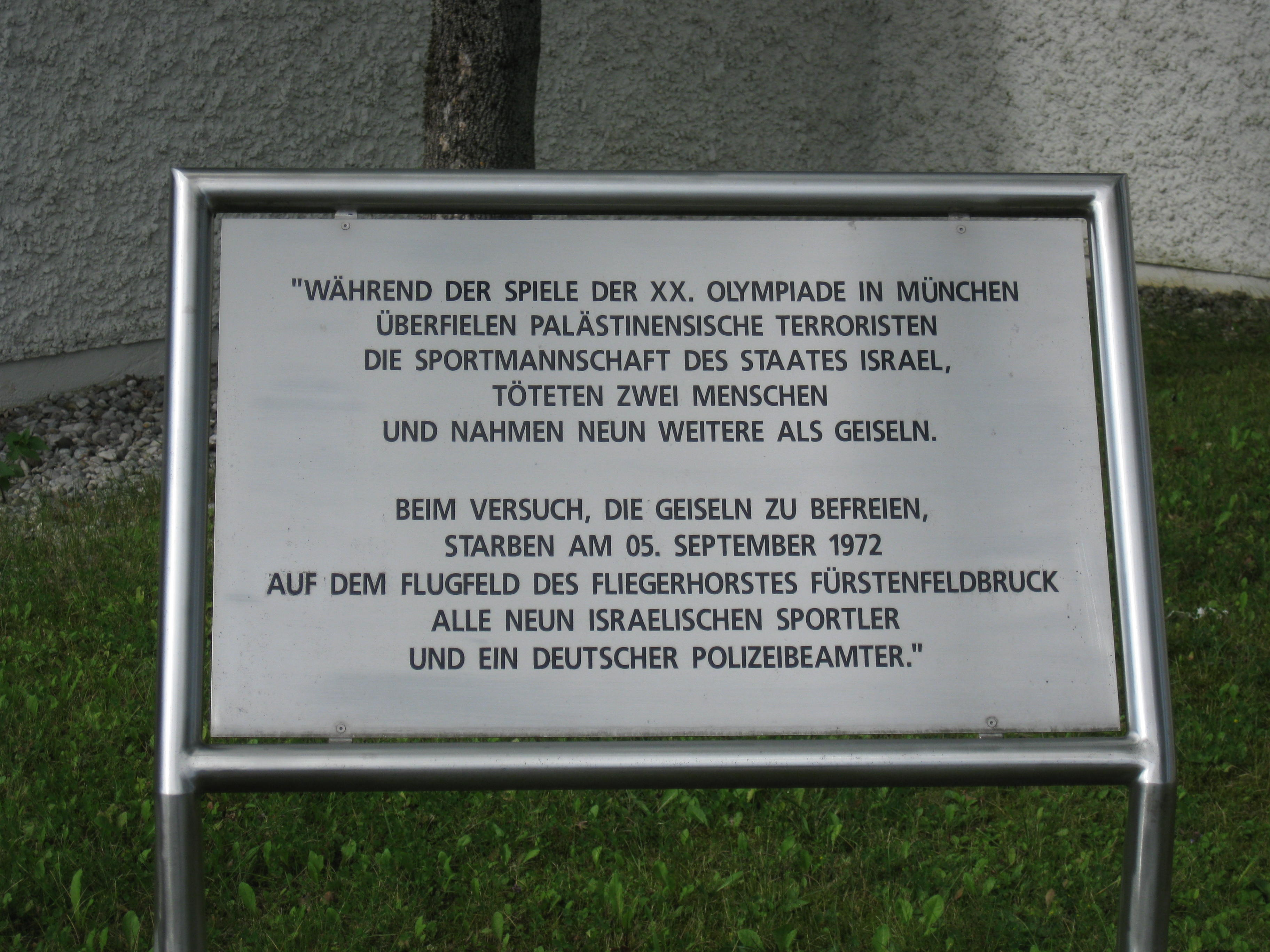 Tafel neben dem Denkmal für die Opfer des Anschlags auf die Olympischen Spiele in München 1972, Fliegerhorst Fürstenfeldbruck